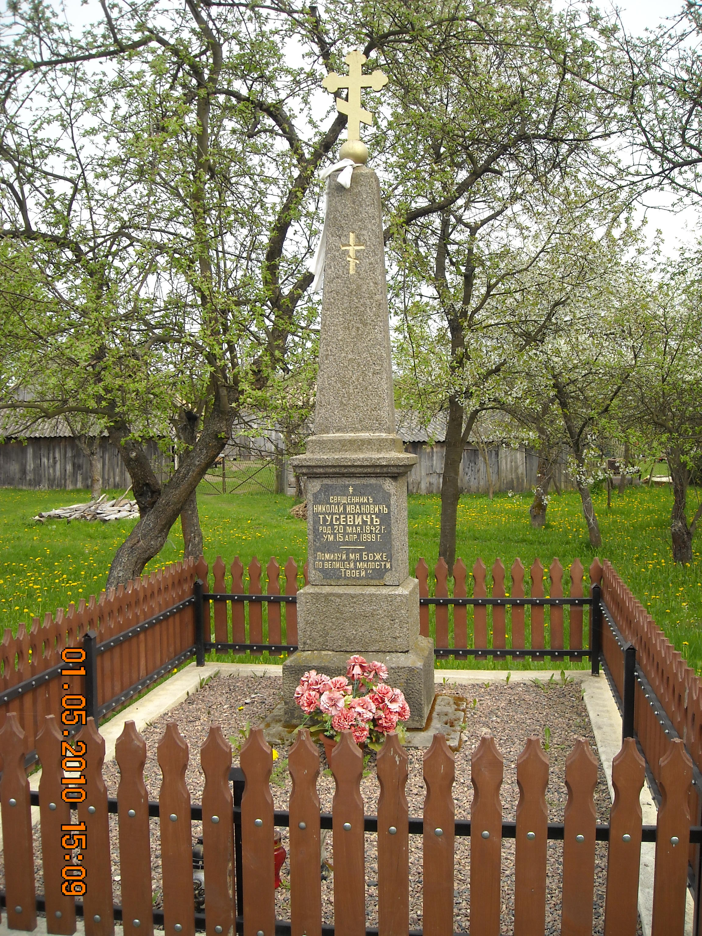 Ruda, pomnik proboszcza parafii prawosławnej Iwana Nikołajewicza Tusiewicza (1842-1899)